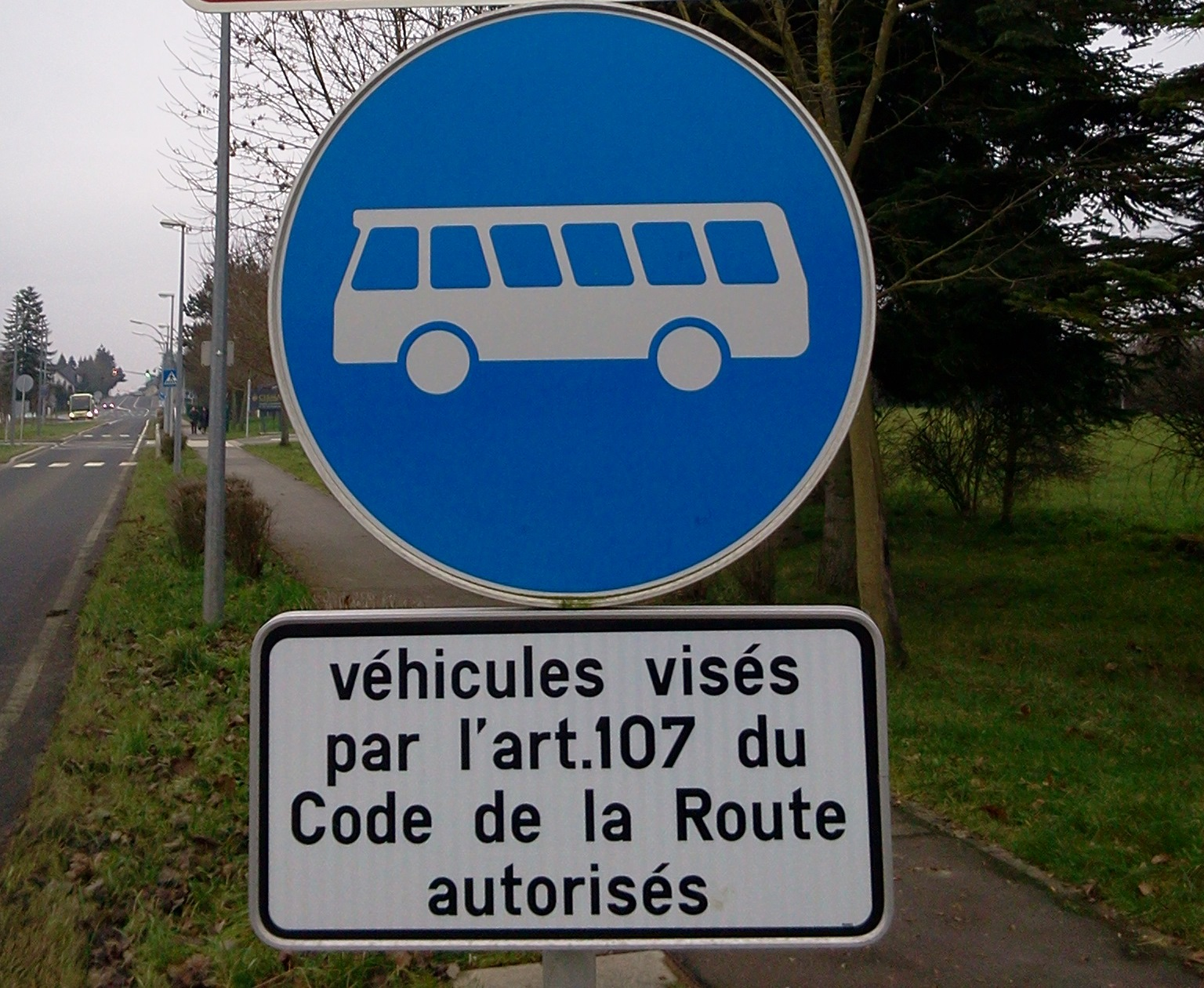 Verkéiersschëld D,10 "Voie réservée aux véhicules des services réguliers de transport en commun" aus dem lëtzebuerger Code de la Route